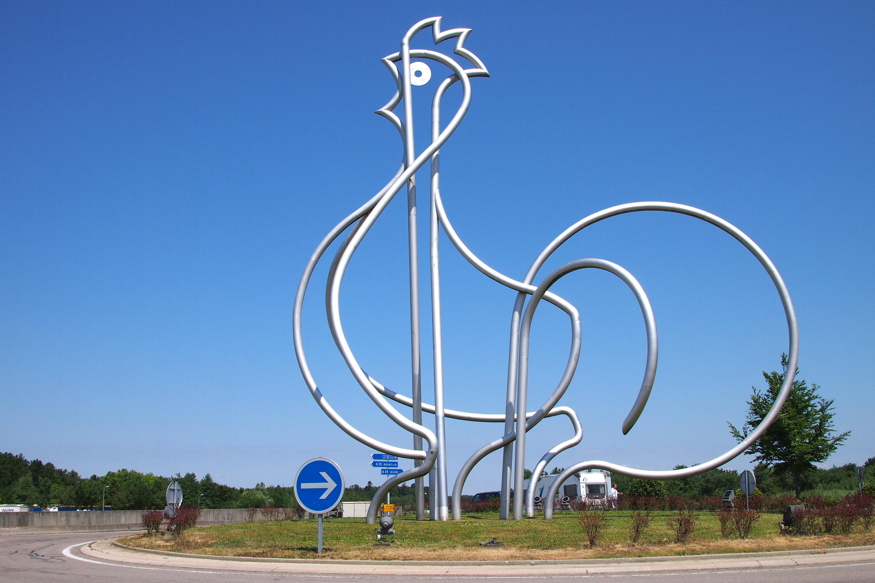 Bressehuhn an der Autobahnraststätte Aire du Poulet de Bresse, (le plus grand poulet du monde). 20 Meter hoch aus Inox